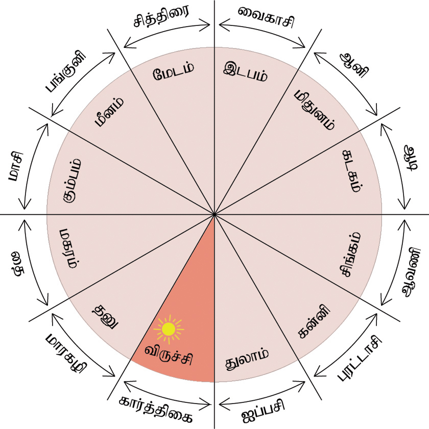 Drawn by the user who uploaded it here.